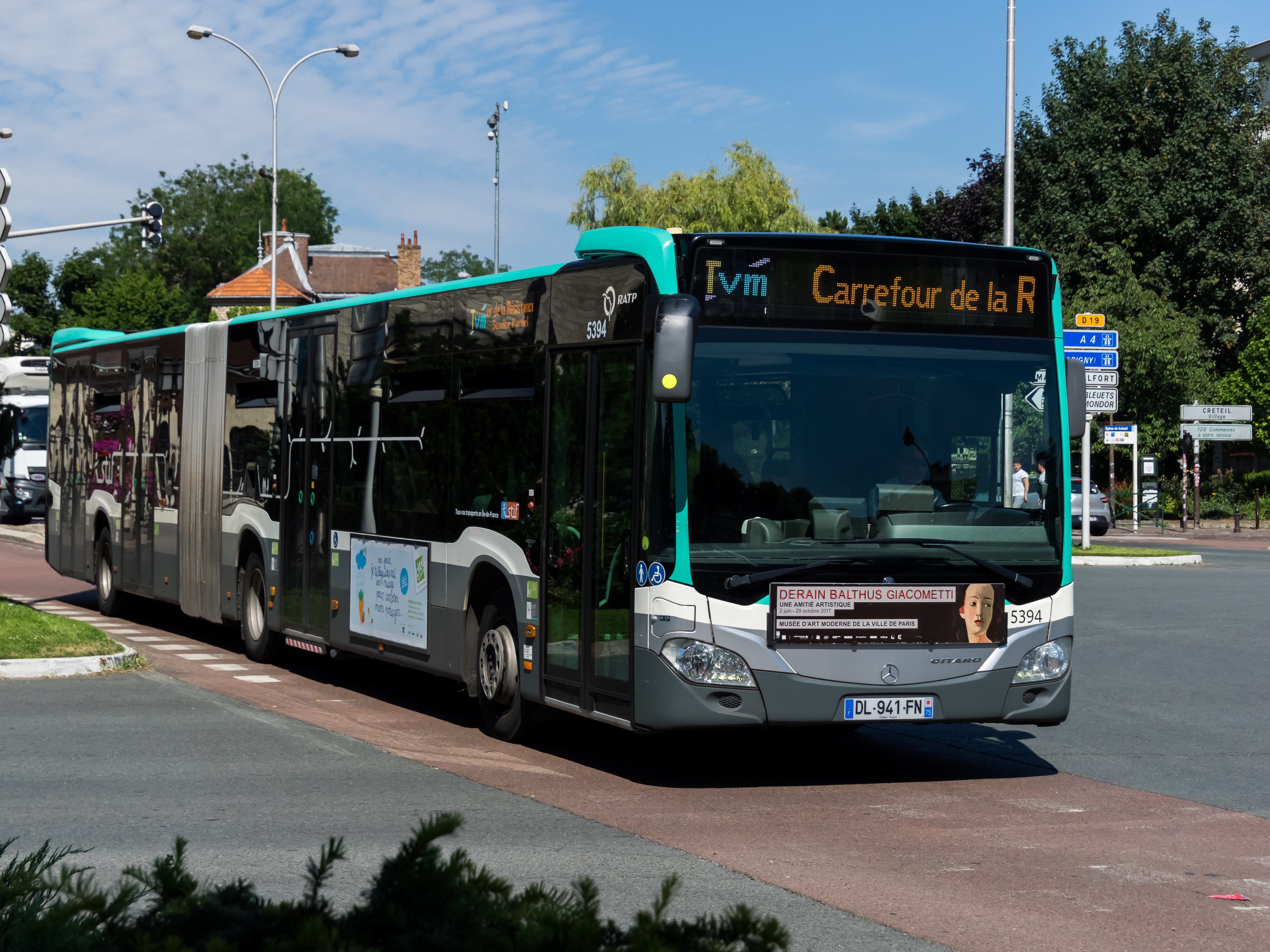 Mercedes Citaro G 5394 RATP, ligne TVM, Créteil